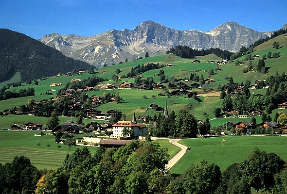 Blick auf Rougemont und die Kette des Vanil Noir im Hintergrund